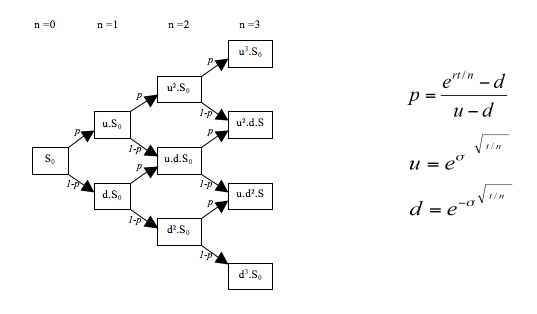 Arbre binomial dans le cadre de l'Analyse par les options réelles.